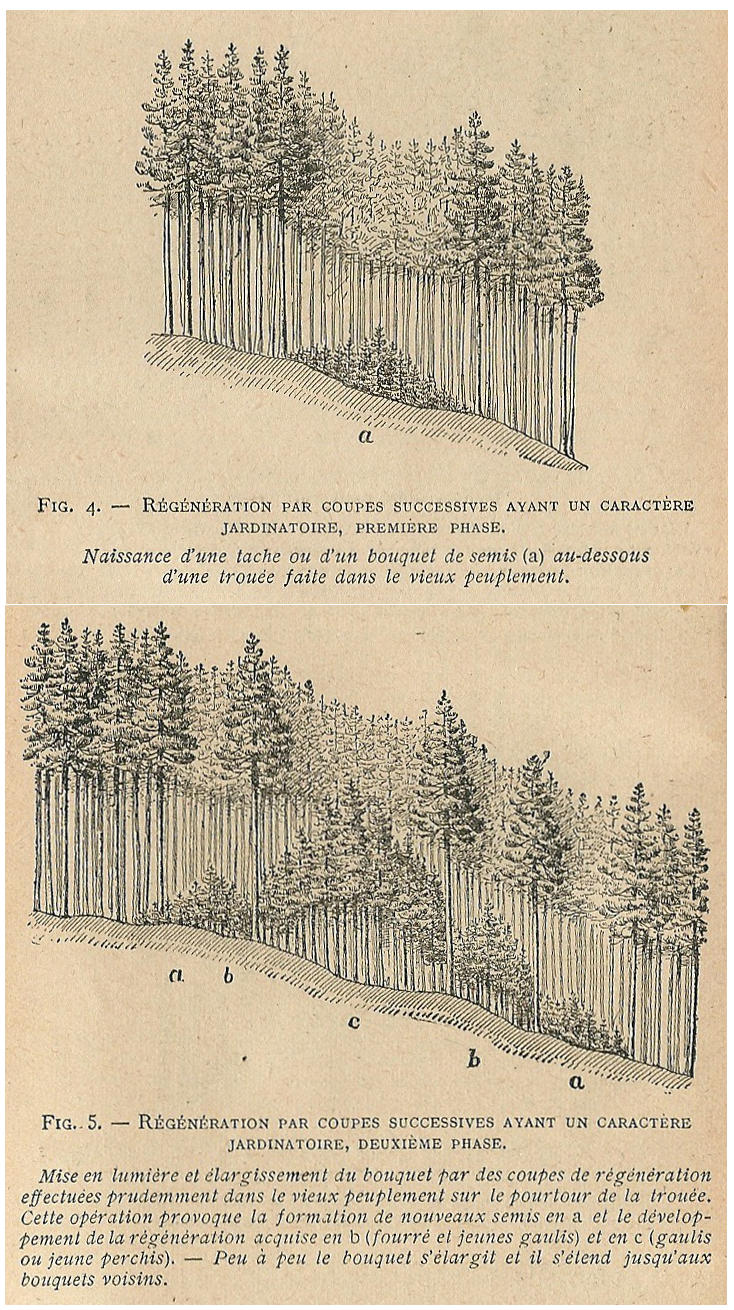 Dessins & explications en français de la régénération forestière par coupes successives ayant un caractère jardinatoire.